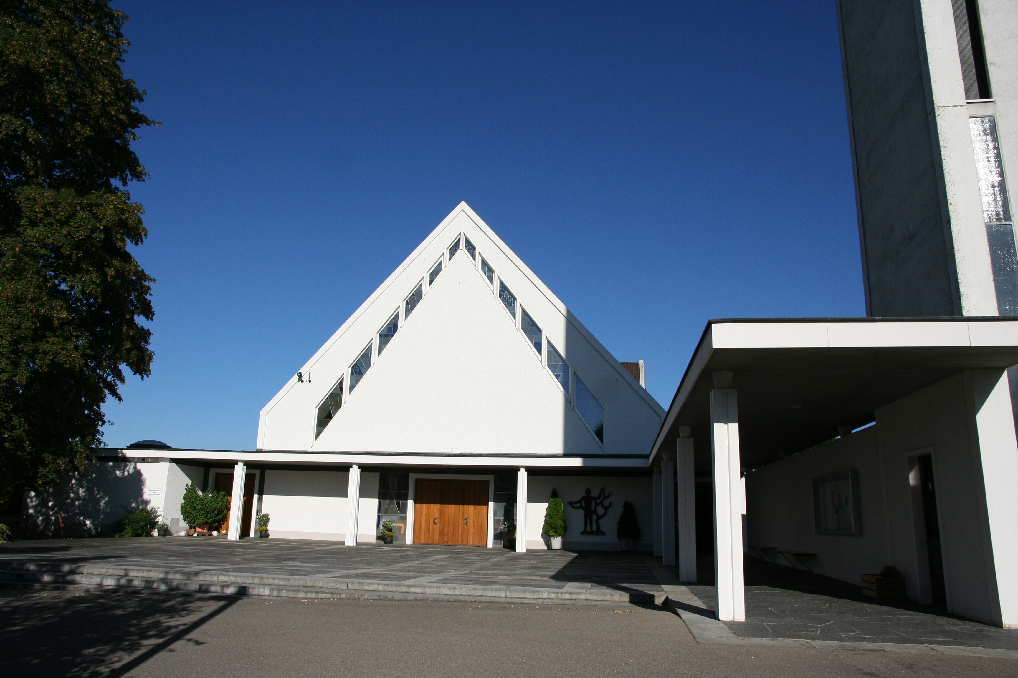 Röm.-kath. Kirche St. Johannes in Wängi